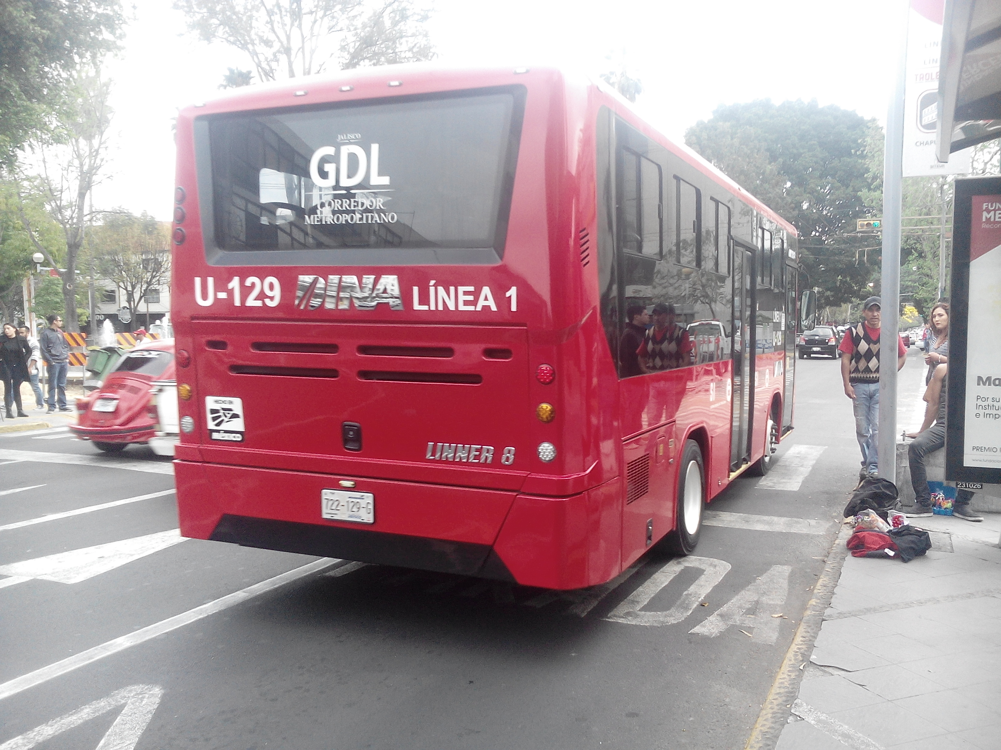 Autobús en Guadalajara, México